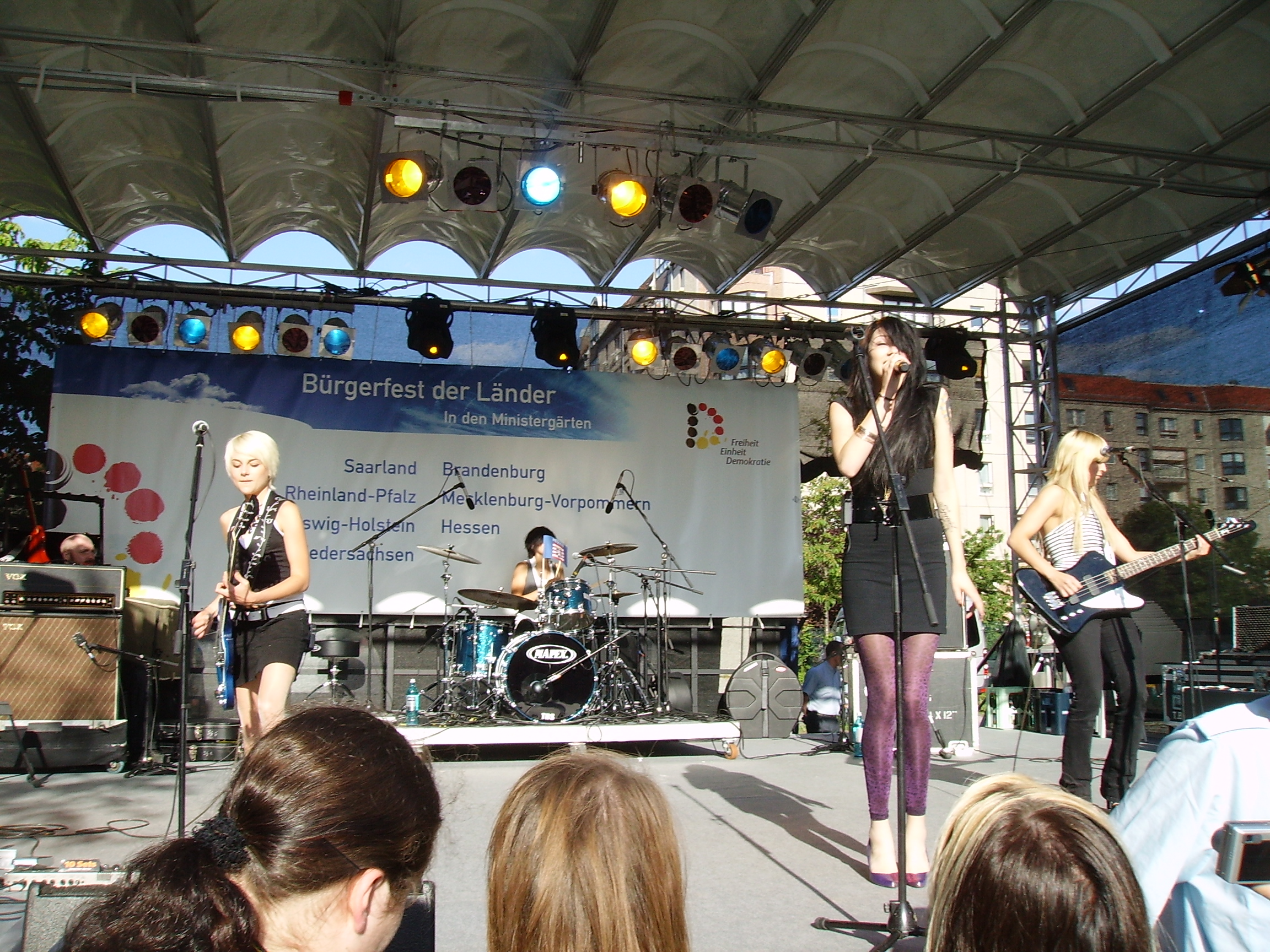 Fräulein Wunder live am 23. Mai 2009 in den Ministergärten Berlin anlässlich des 60. Jahrestages der Verabschiedung des Grundgesetzes